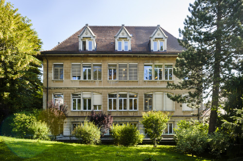 Villa Marguerite, abritant autrefois le Musée de la Manufacture Girard-Perregaux.